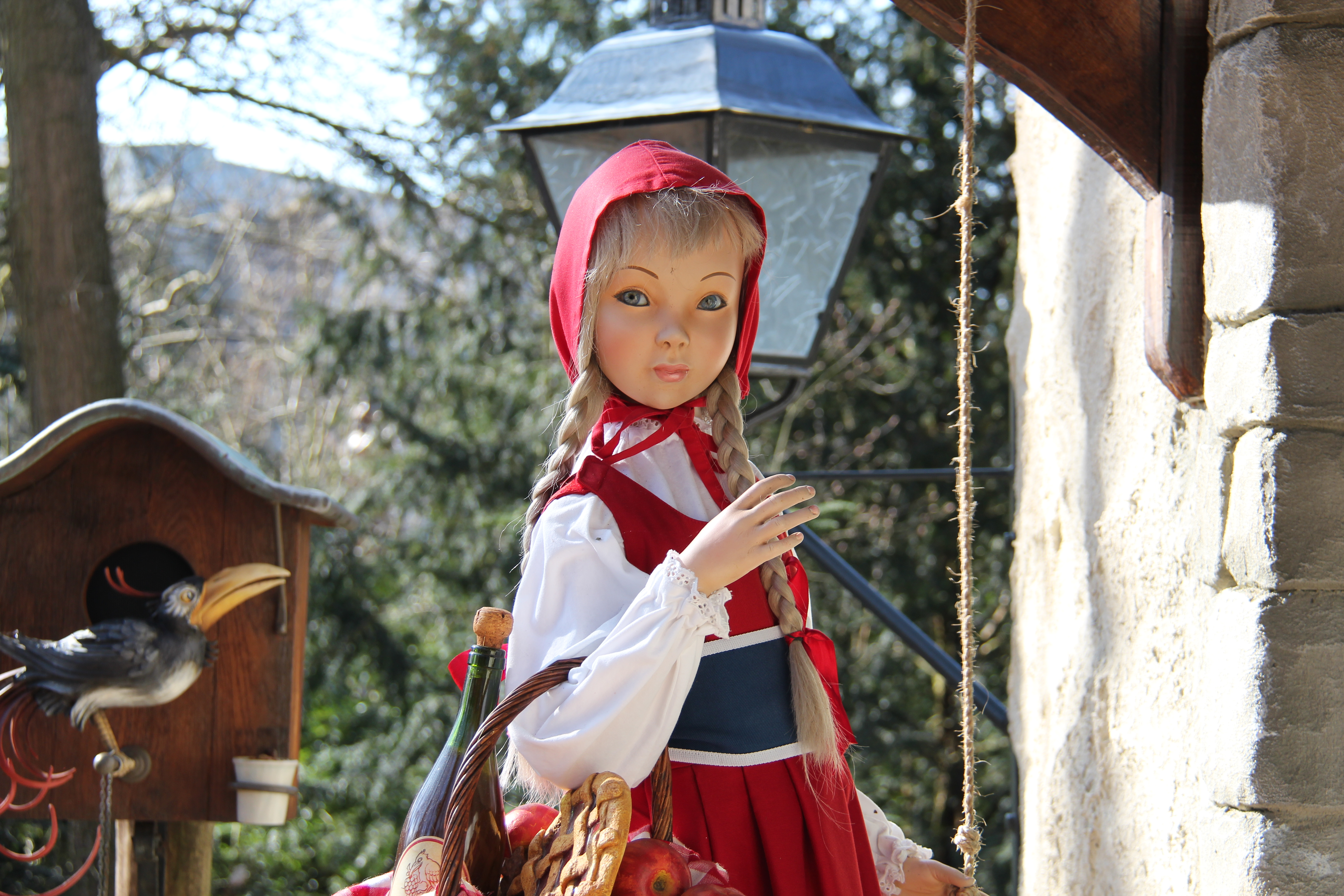 Roodkapje in het Sprookjesbos.